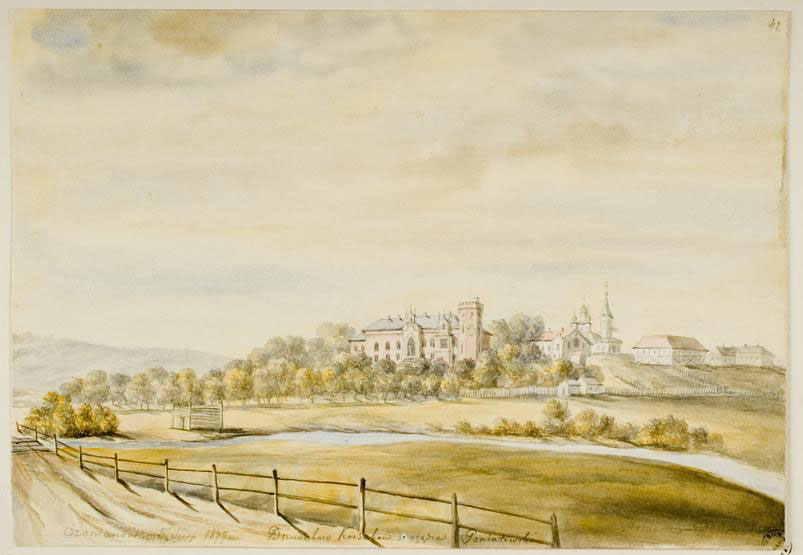 Беларуская (тарашкевіца): Раманаў (Ramanaŭ)